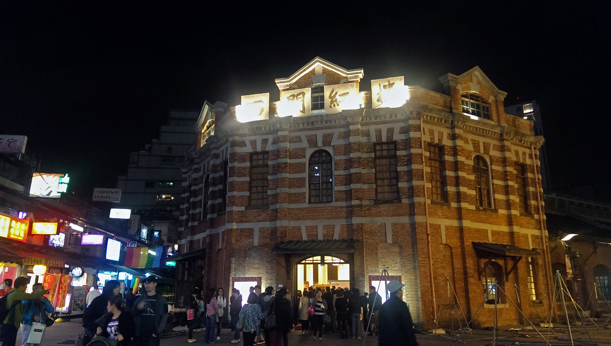 中文（台灣）: 西門紅樓夜景